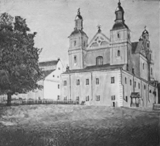 Беларуская (тарашкевіца): Глыбокае (Hłybokaje), вуліца Полацкая (vulica Połackaja). Касьцёл і кляштар кармэлітаў